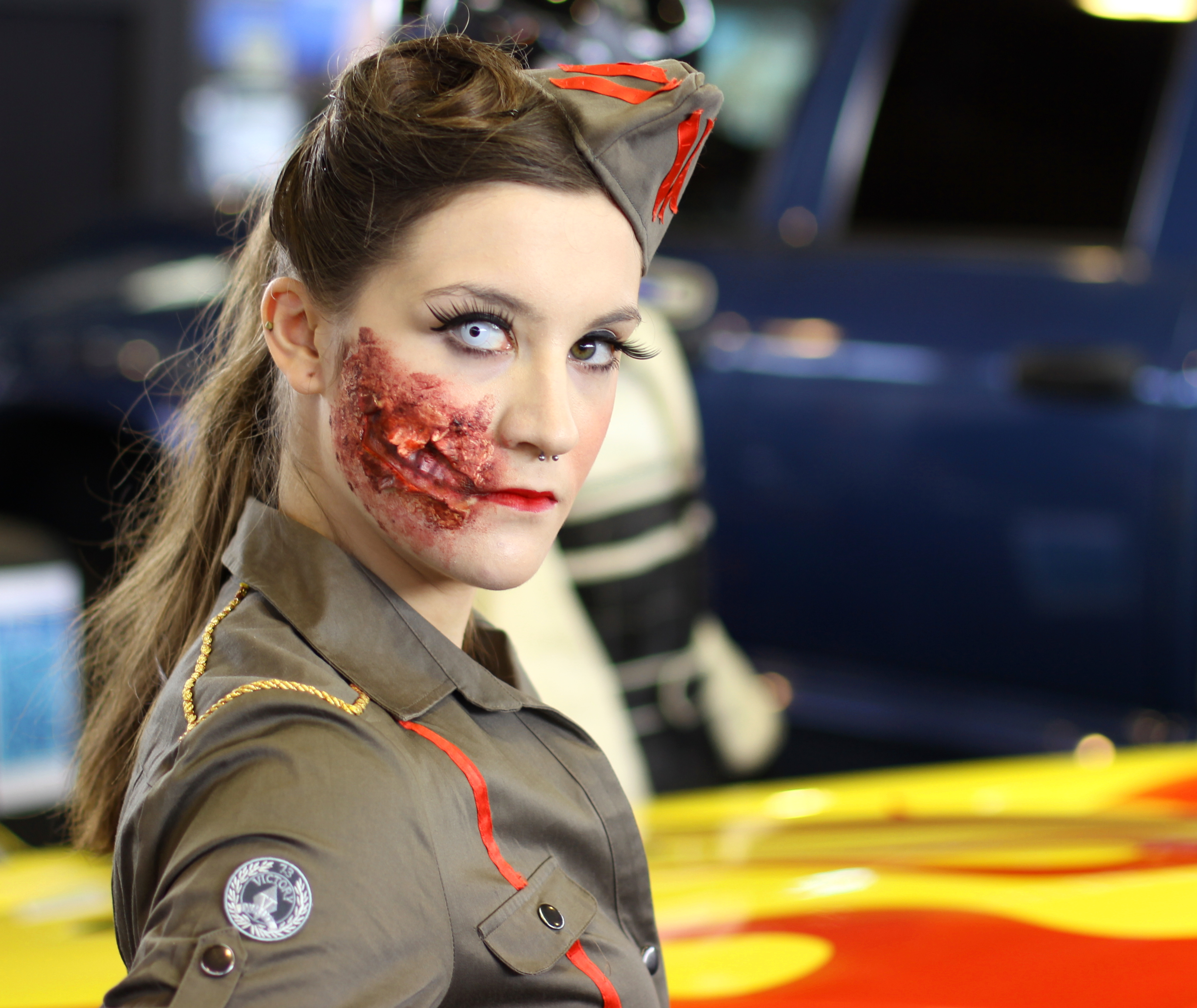 Modell "sex sells", Tuning World Bodensee 2014